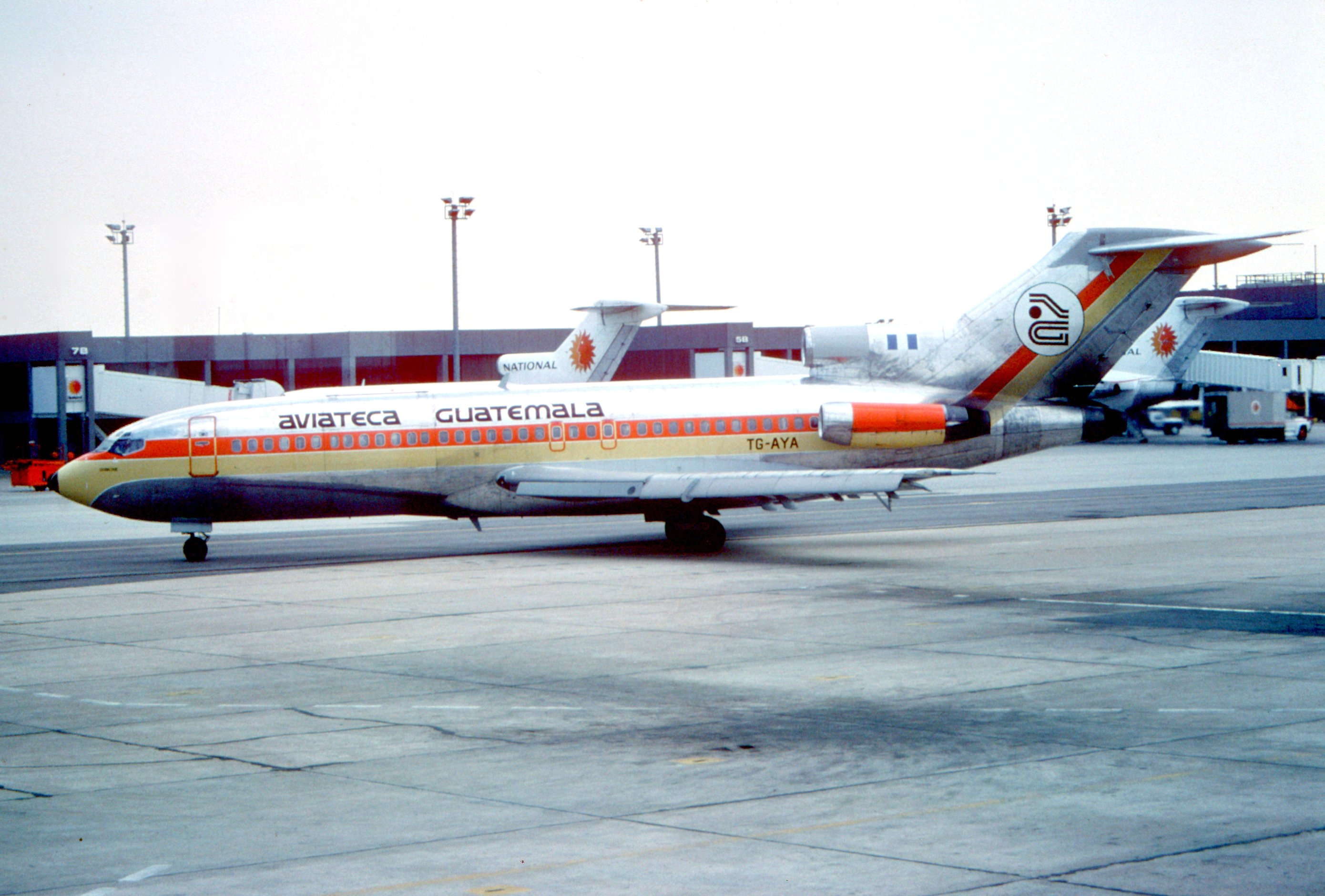 AVIATECA Guatemala Boeing 727-173C; TG-AYA, June 1980/ DSG